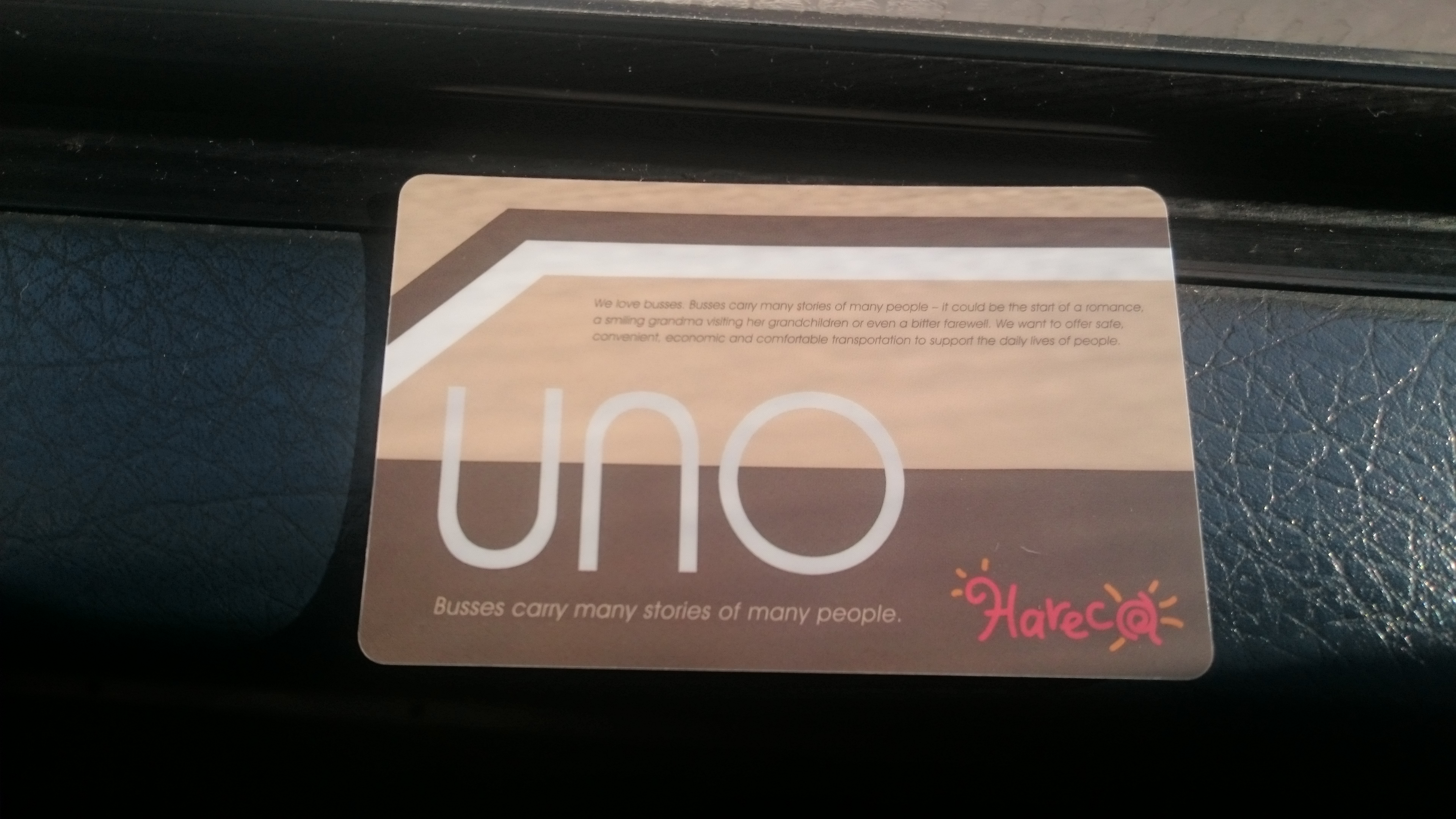 宇野自動車発行の限定ハレカカードです